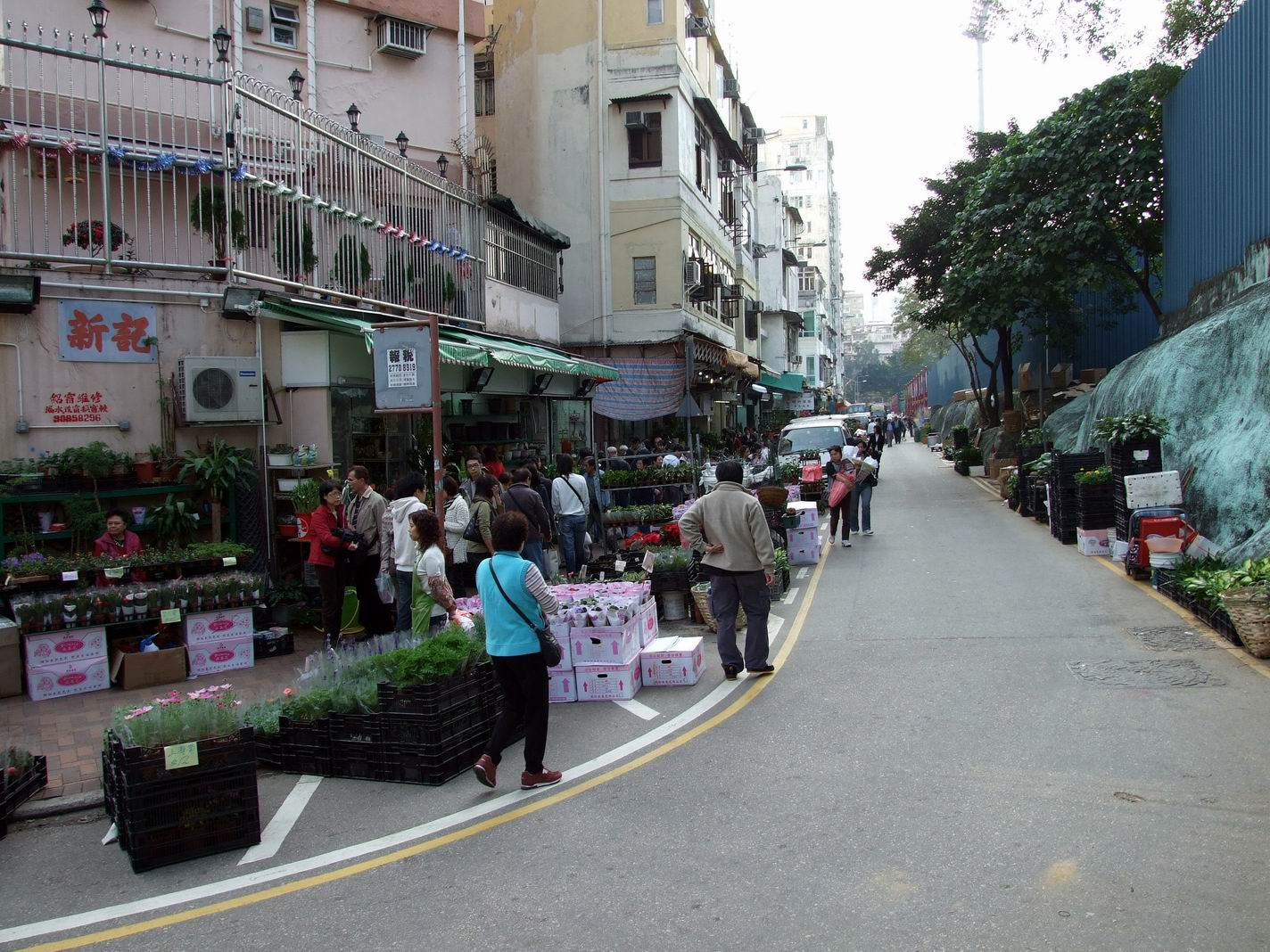 花墟道，照片右方為zh:旺角大球場